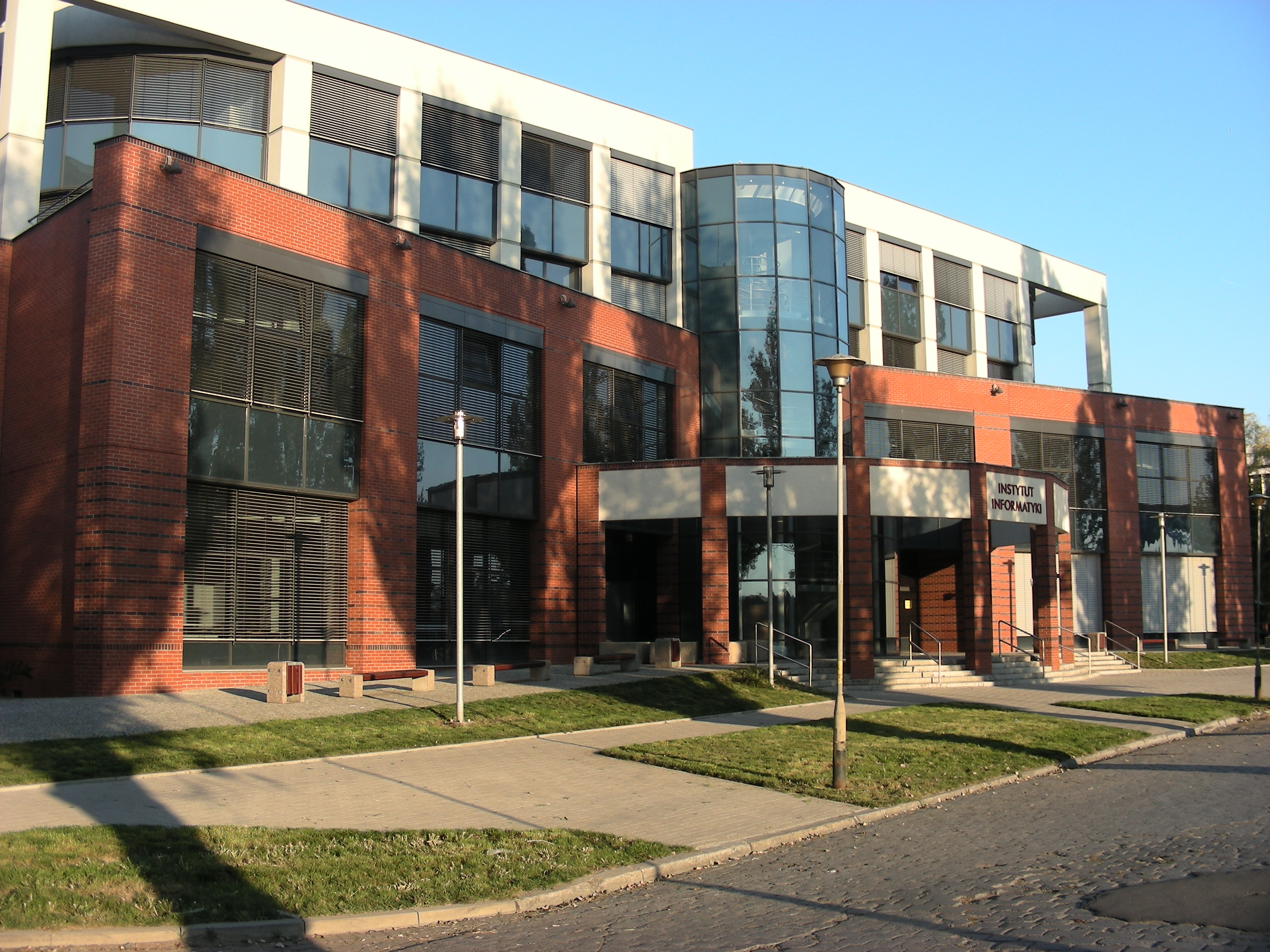 Instytut Informatyki Uniwersytetu Wrocławskiego